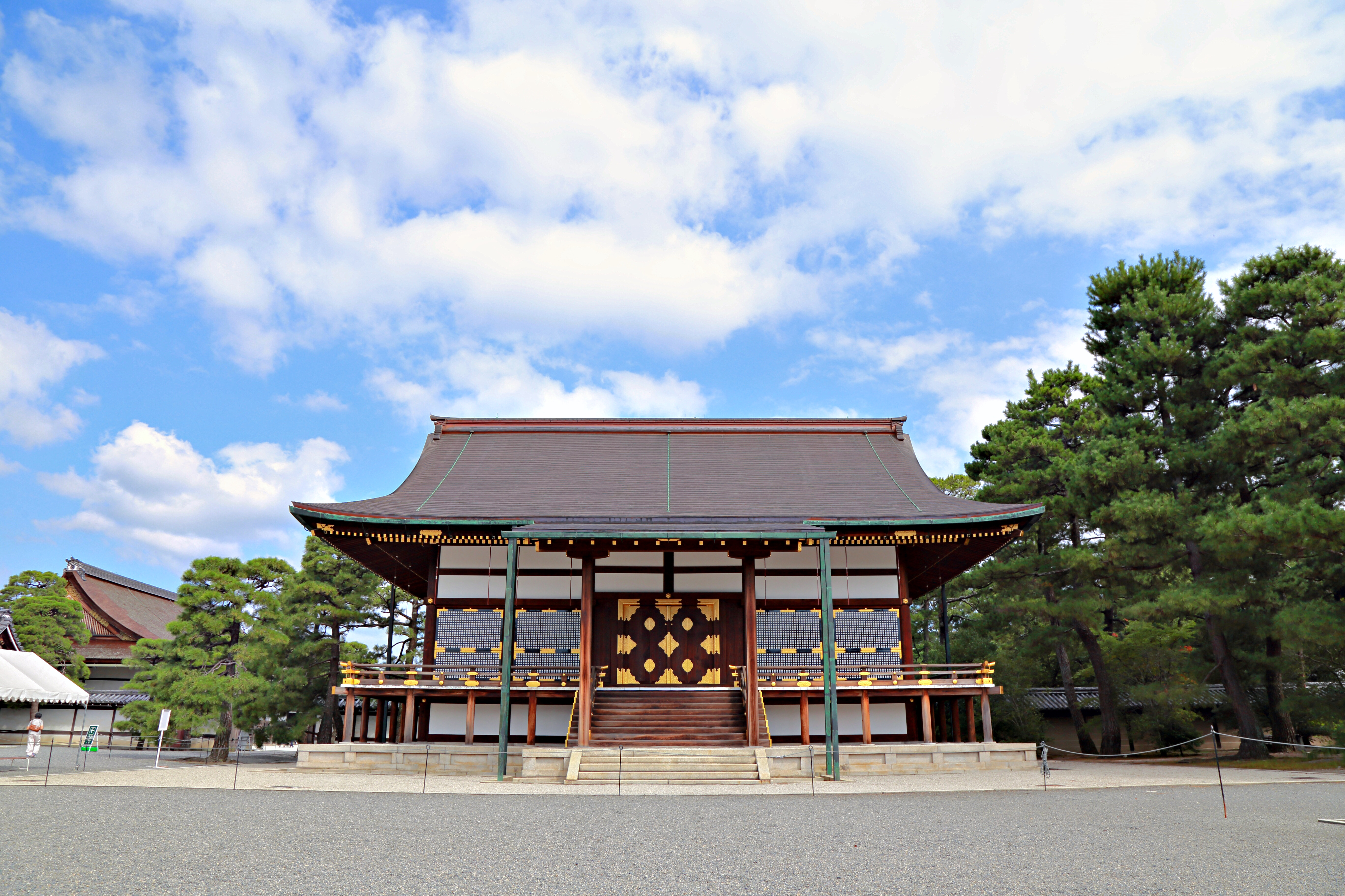 京都御所东侧的春兴殿